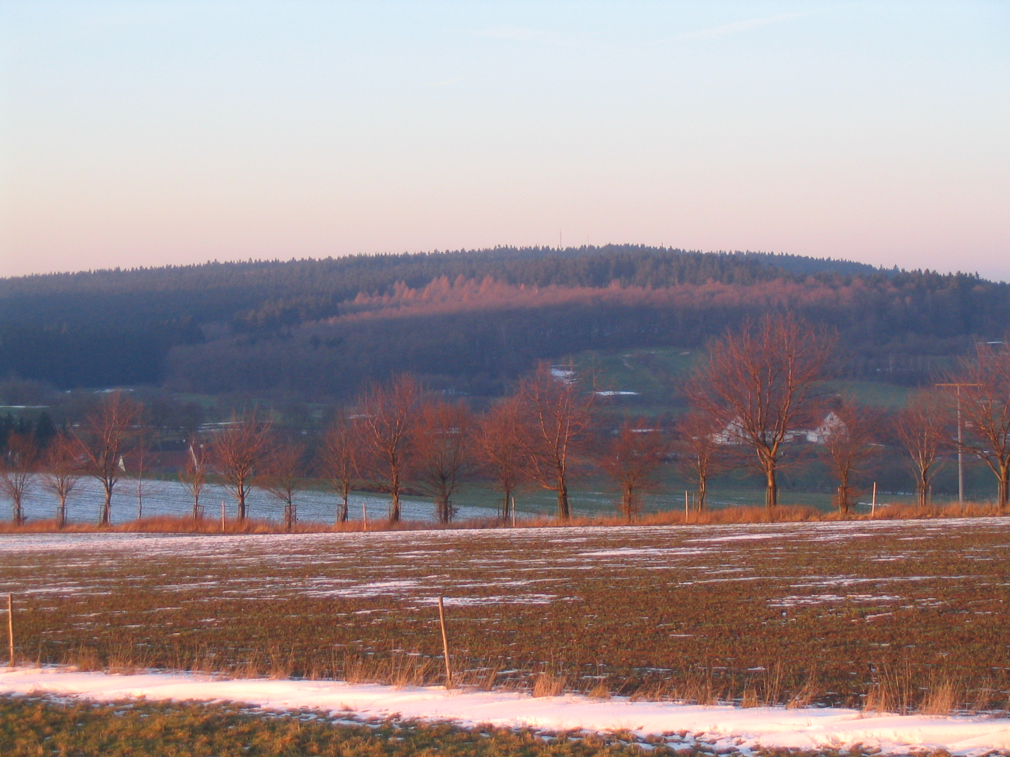 Der Berg Horst im Spessart von Süden, aufgenommen bei Lettgenbrunn im Jossgrund. Im Bild auch Häuser des Ortsteils Villbach.